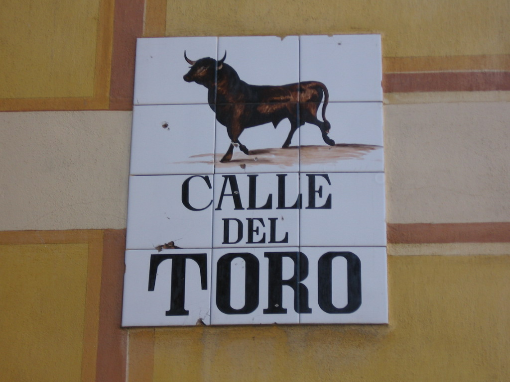 Calle del Toro, Madrid.